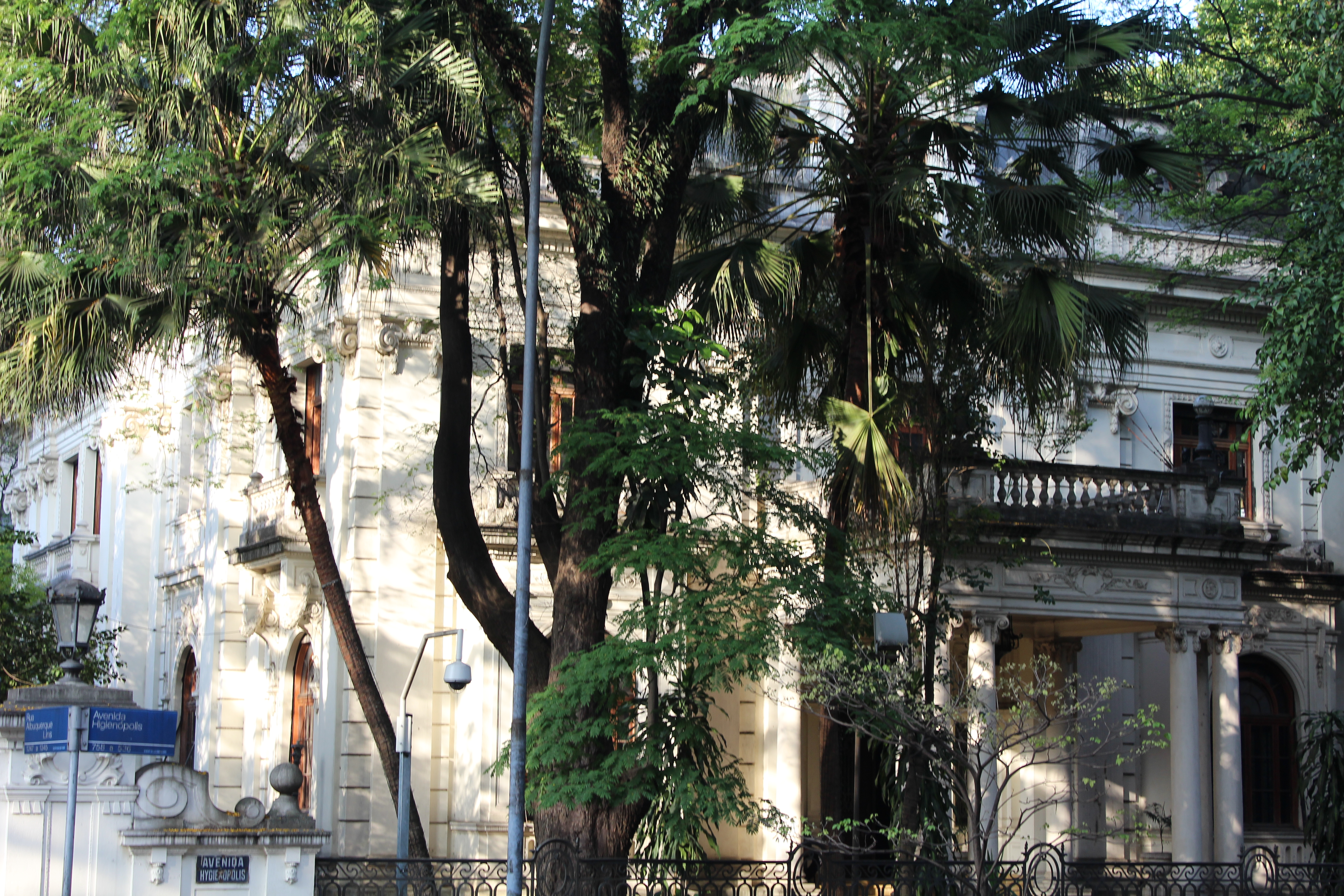 Fachada vista à luz do dia da Casa de Nhonhô Magalhães, localizada no bairro de Higienópolis, em São Paulo, Brasil.